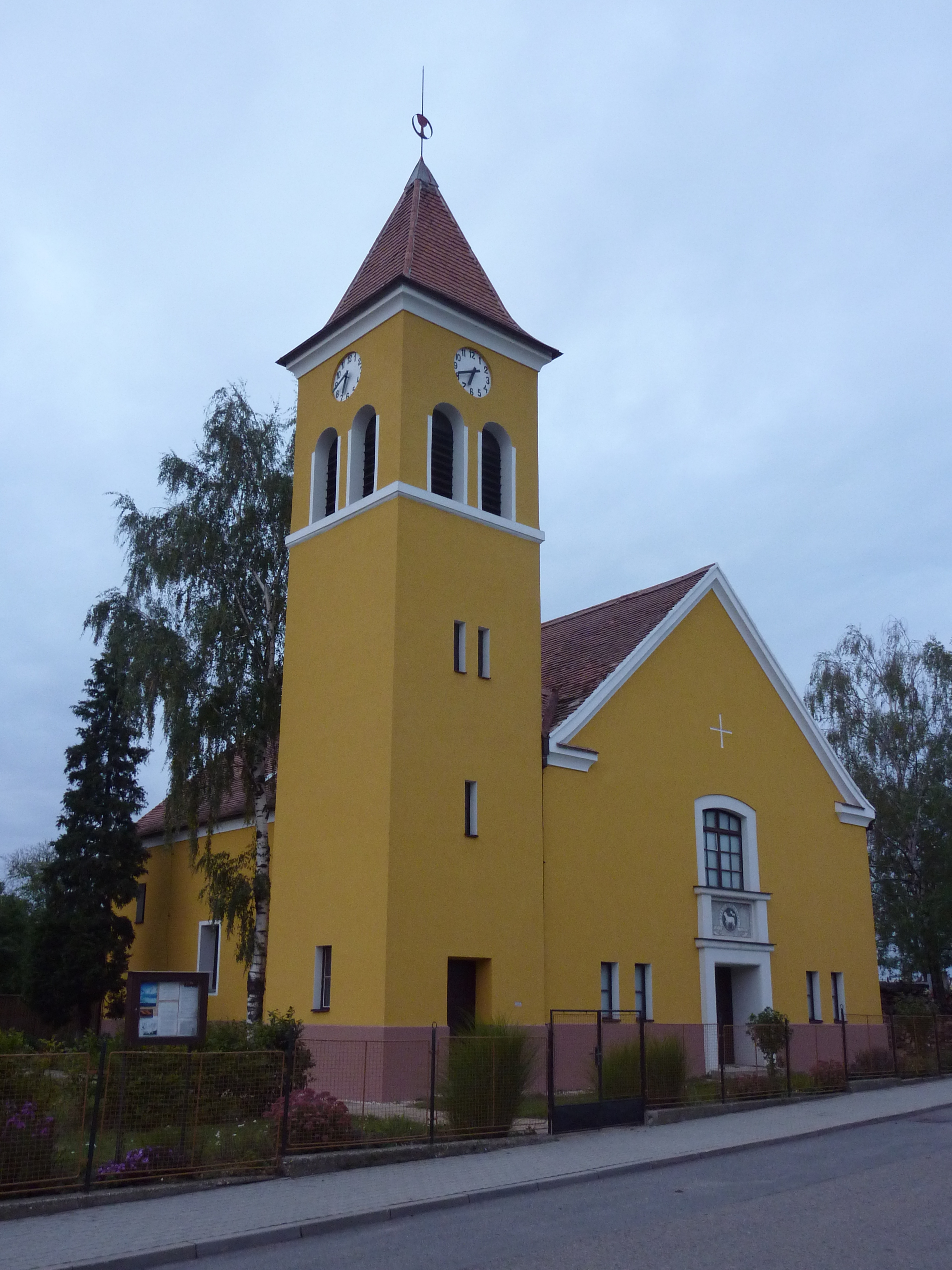 Hrubá Vrbka, kostel Českobratrské církve evangelické